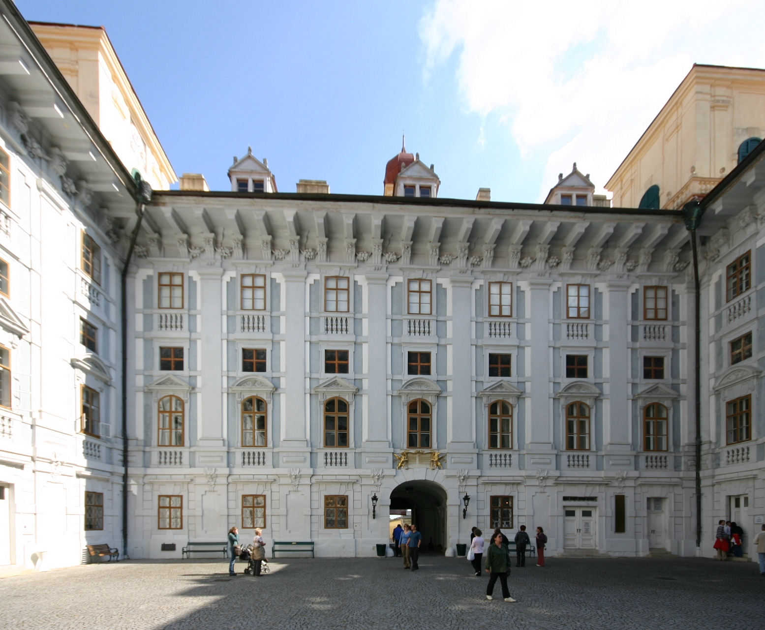 Innenhof von Schloss Esterházy